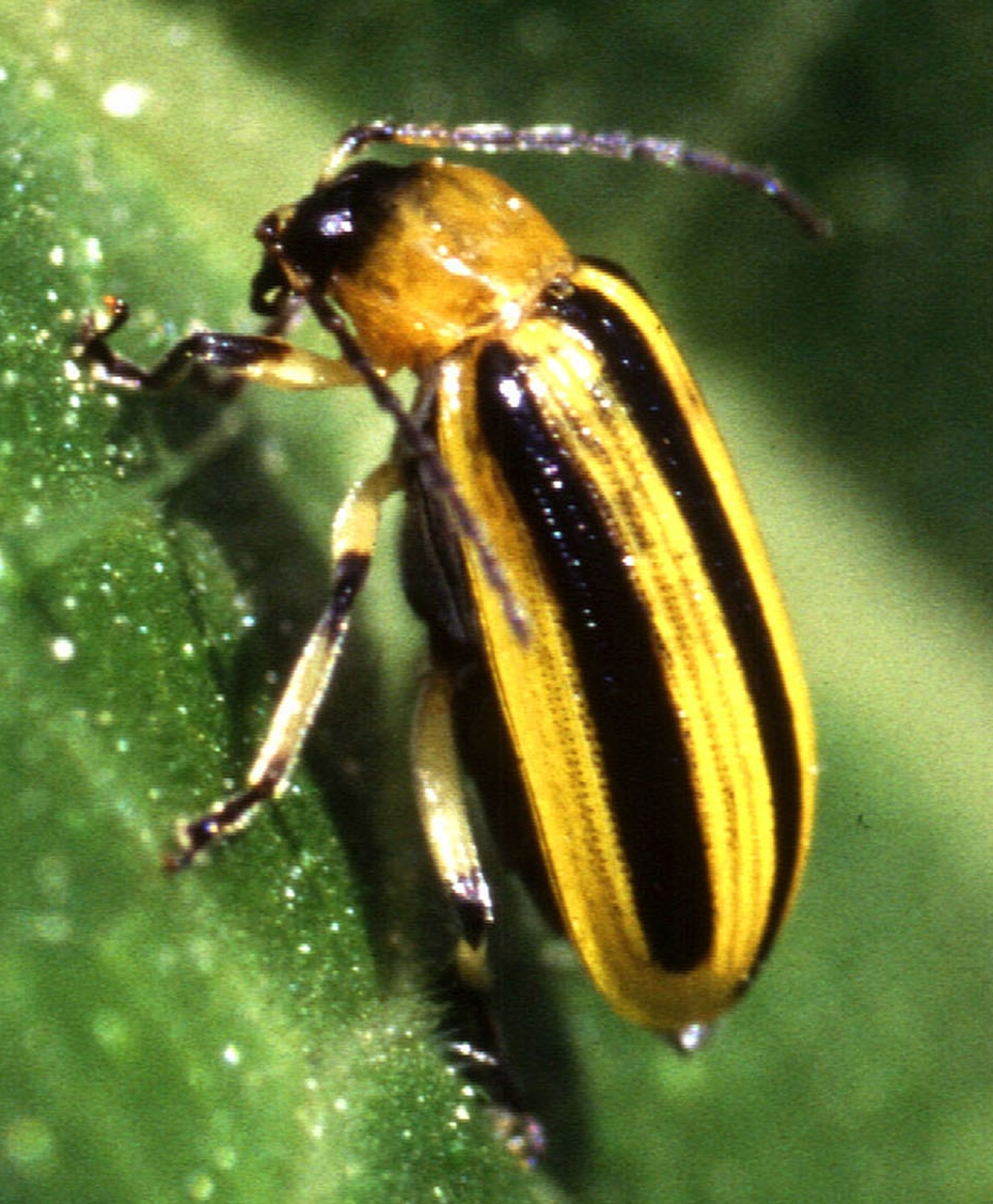 Acalymma vittatum